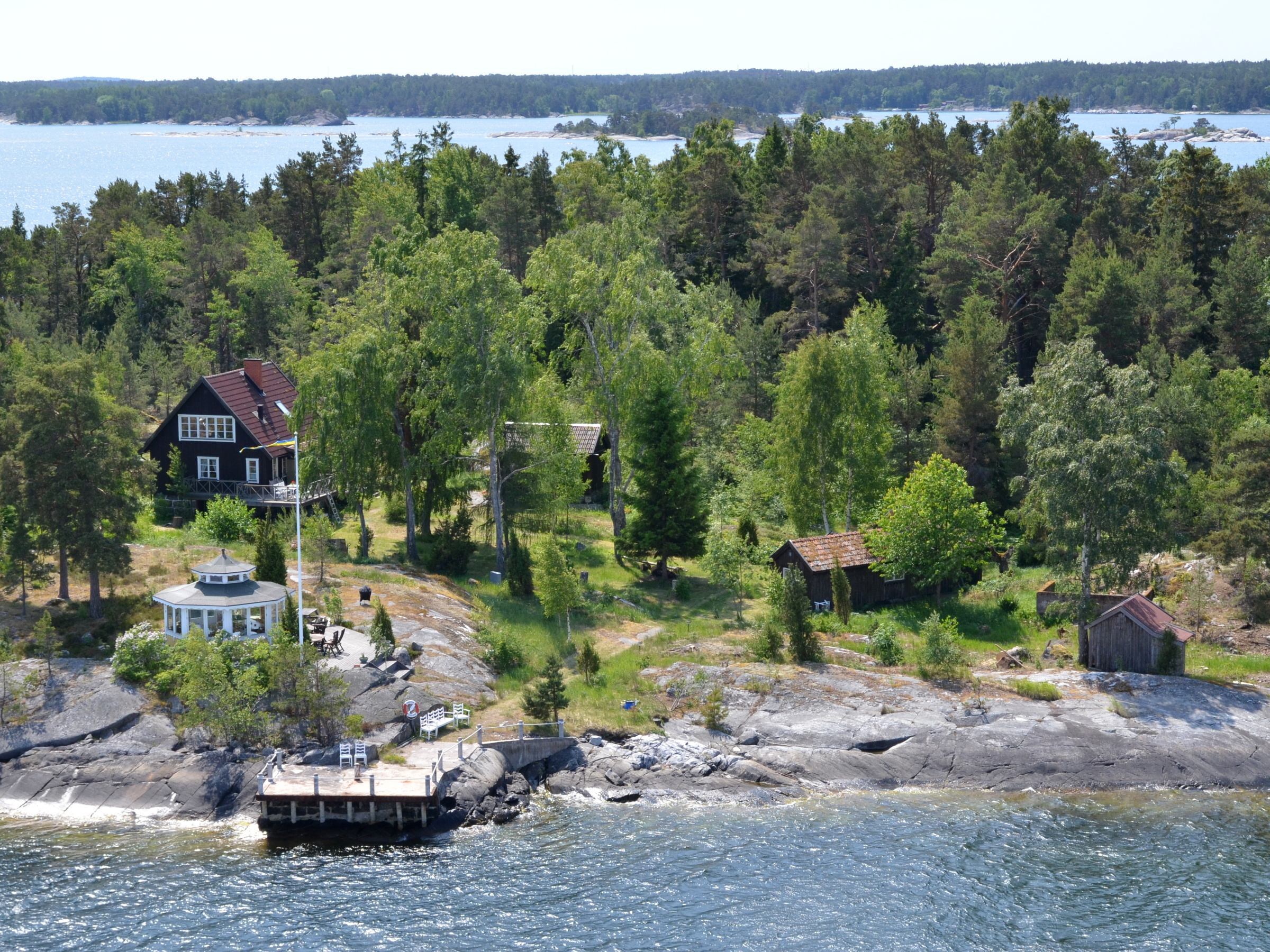 Ängsholmen vid Kanholmsfjärden i Stockholms skärgård.